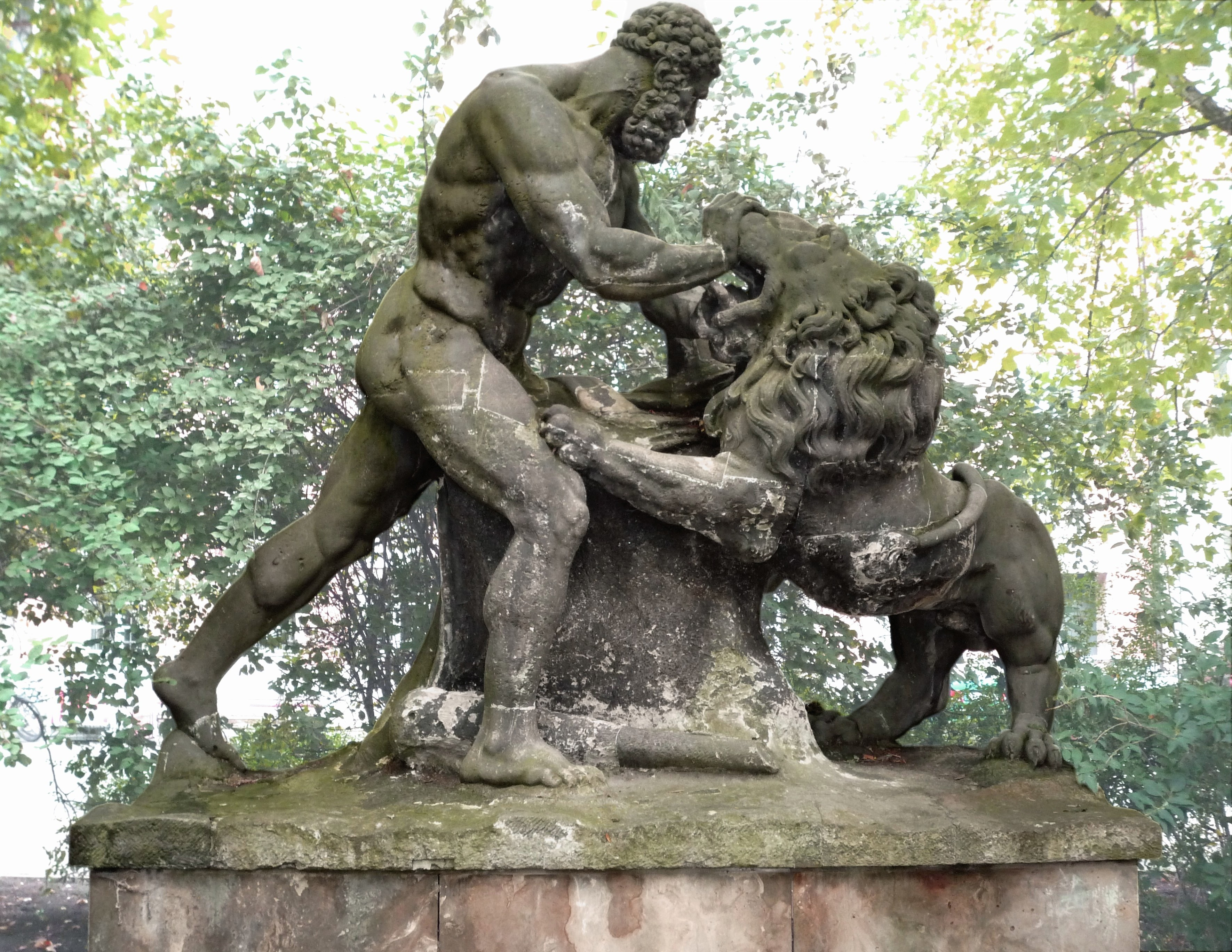 Lapidarium (Sammlung von Bildwerken aus Stein) im Köllnischen Park im Berliner Stadtbezirk Mitte. Figurengruppe "Herkules (Herakles), den Nemëischen Löwen bezwingend", Entwurf von Gottfried Schadow.